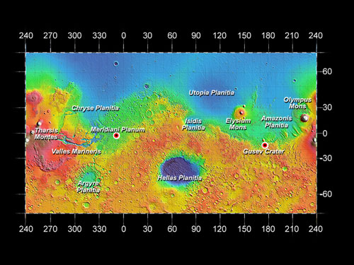 Карта